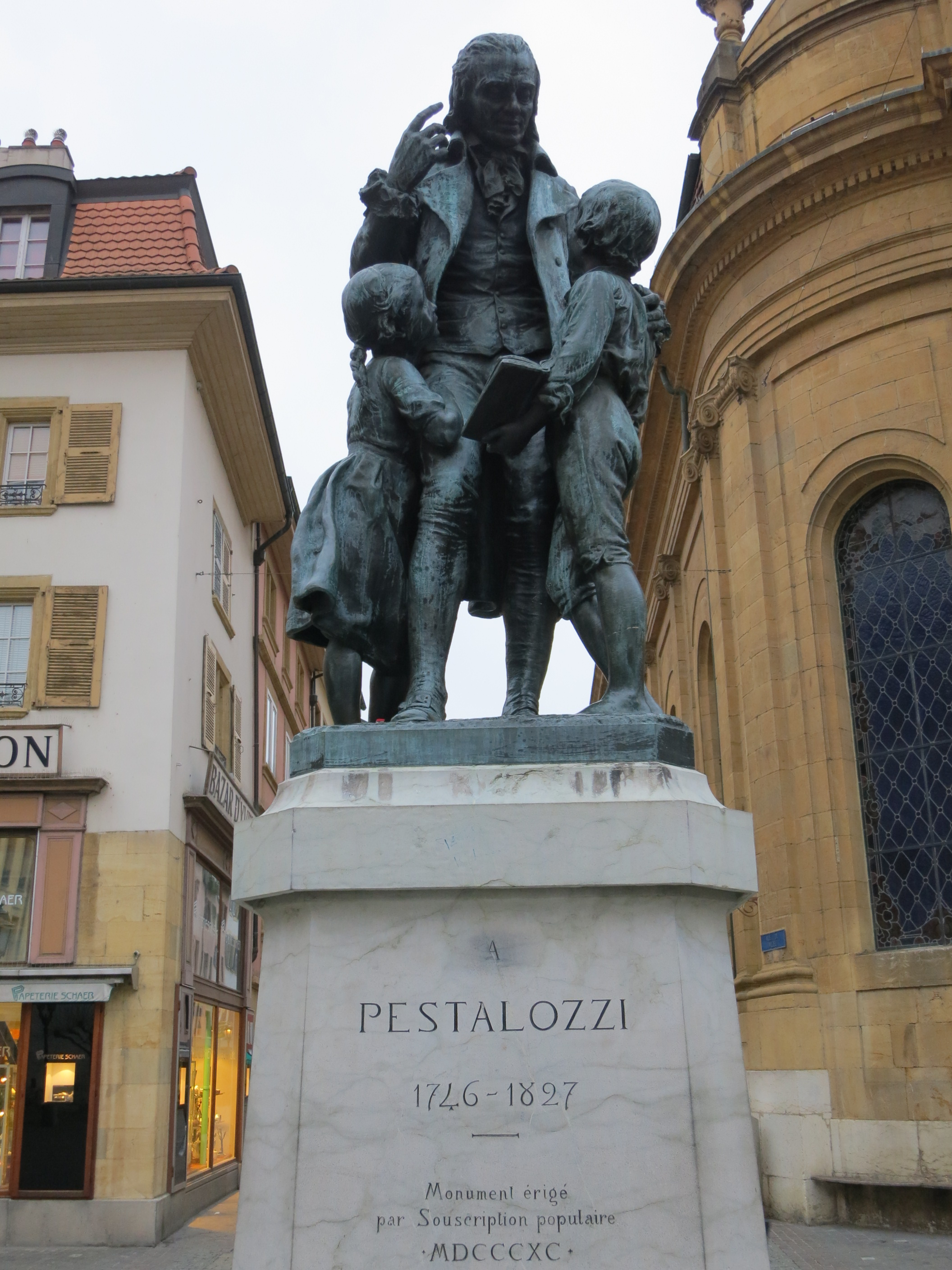 Pestalozzidenkmal, Yverdon-les-Bains, Schweiz